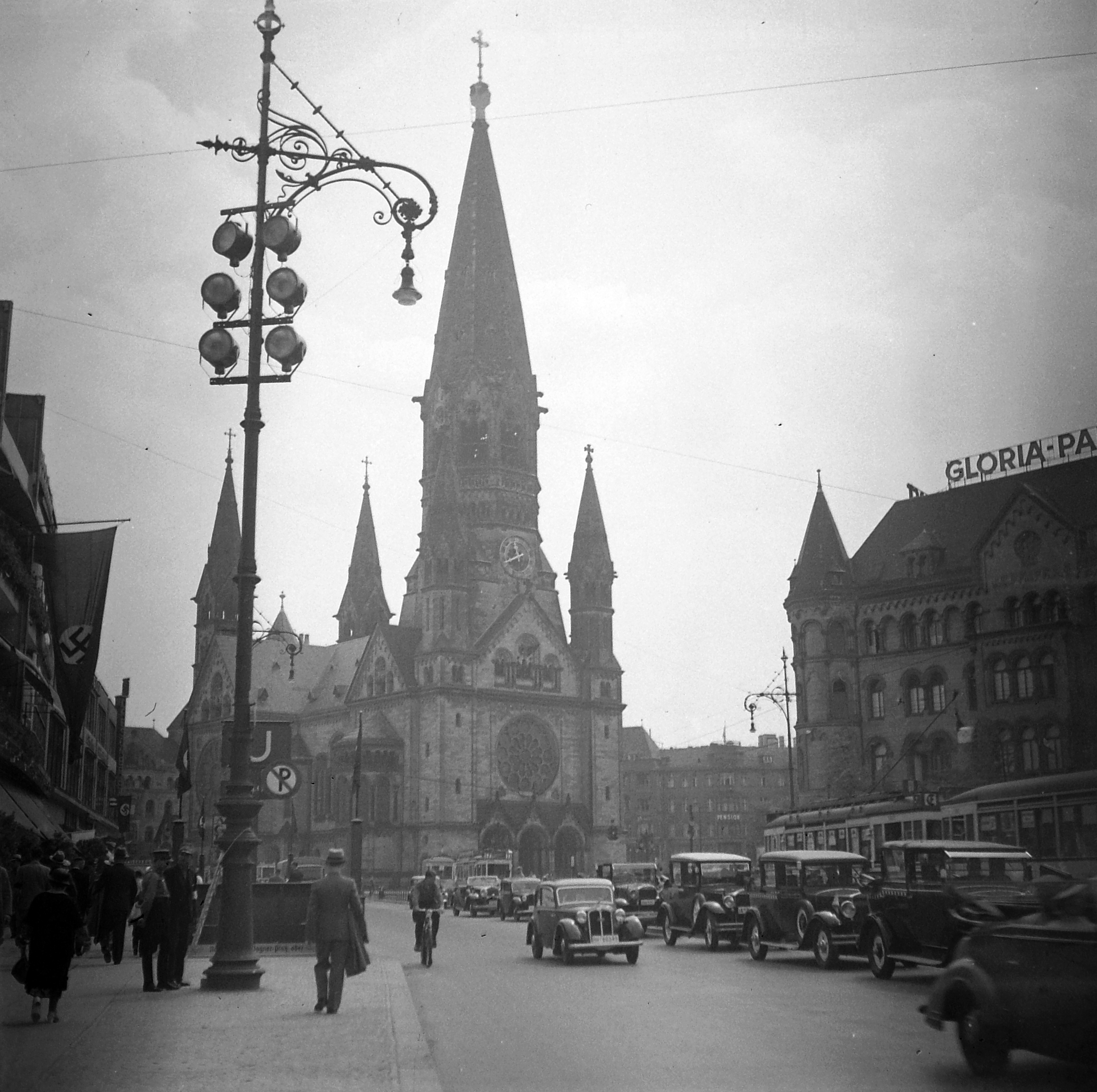 Kaiser-Wilhelm-Gedächtniskirche. Location: Germany, Berlin Tags: church, lamp post, subway, automobile, church clock, neon sign, swastica, street view Title: Kaiser-Wilhelm-Gedächtniskirche.